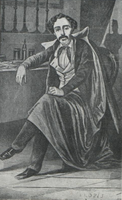 El general Jaime Ortega en capilla